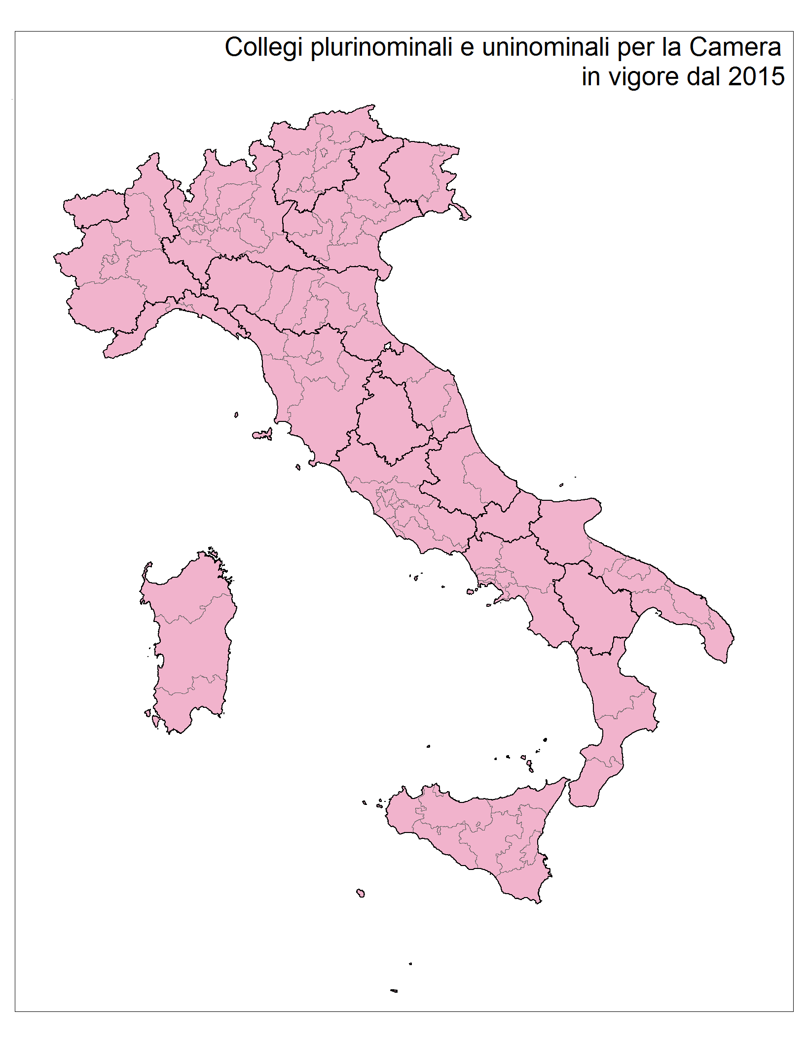 Collegi plurinominali e uninominali per la Camera dei Deputati italiana previsti dall'Italicum e in vigore dal 2015